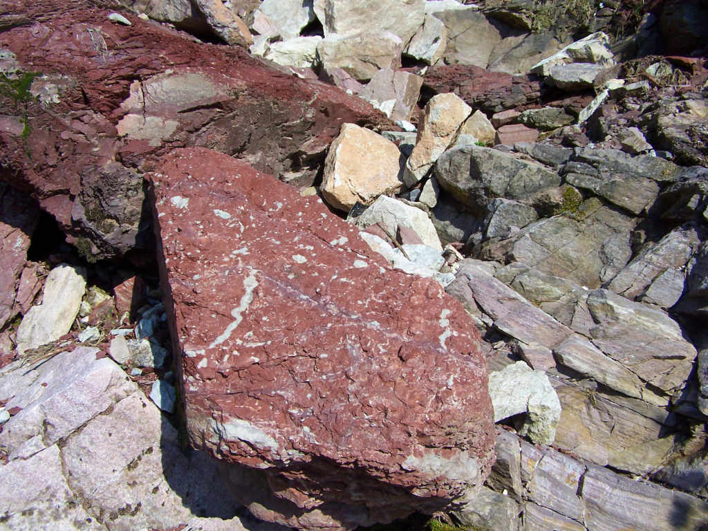 Skała z rudą żelaza (Czerwony Żleb w masywie Ciemniaka, Tatry Zachodnie)